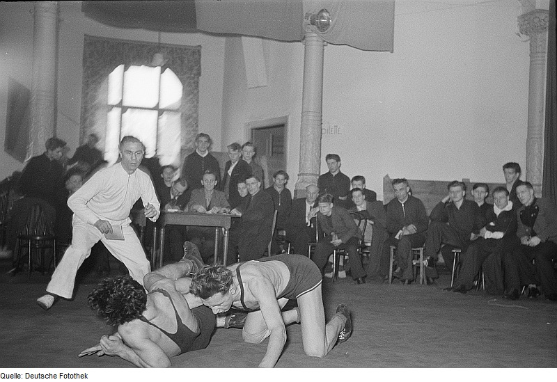 Original image description from the Deutsche Fotothek Ringerwettkampf